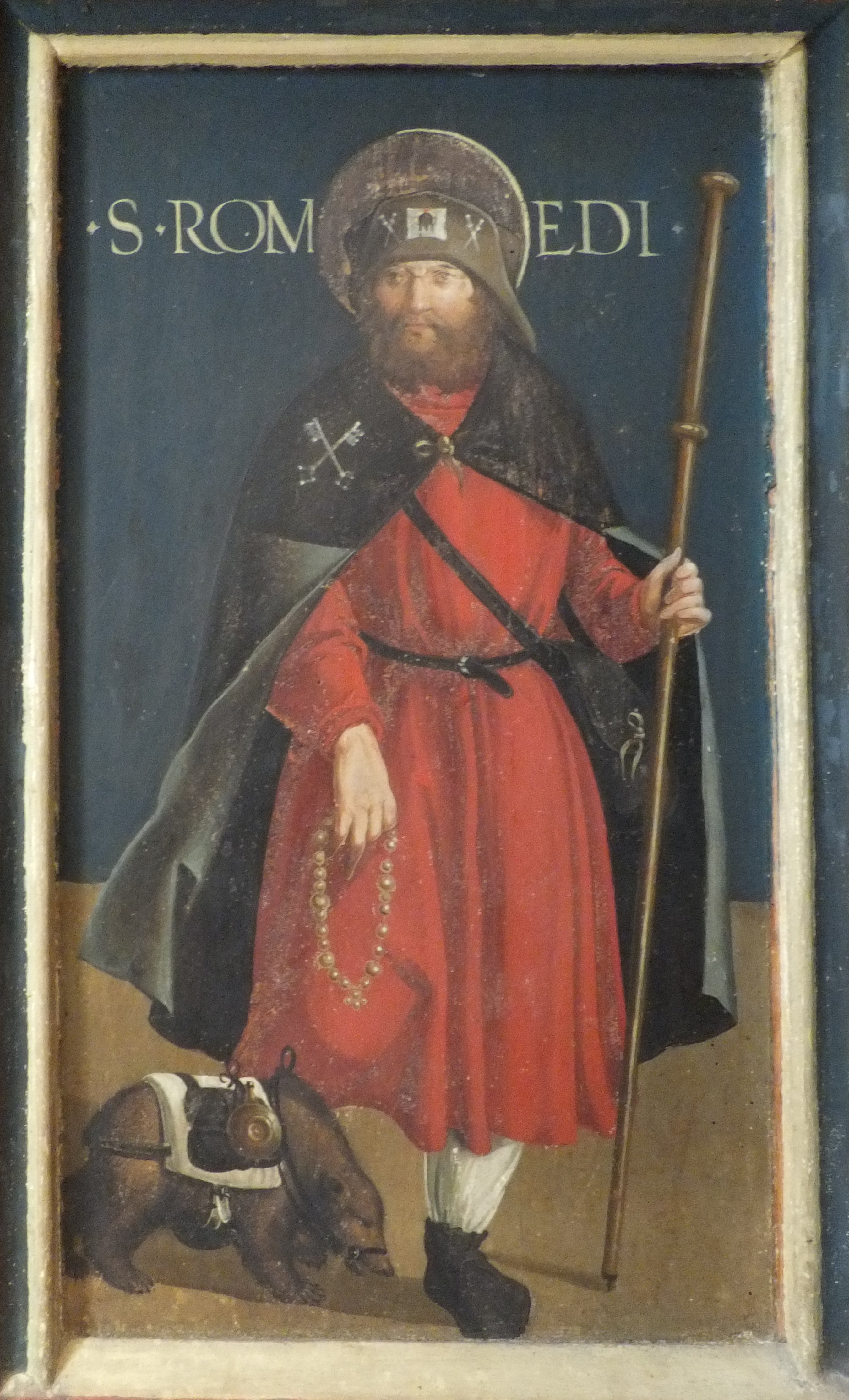 San Romedio dipinto in un altare a portelle della cerchia di Jörg Lederer, Museo Diocesano Tridentino